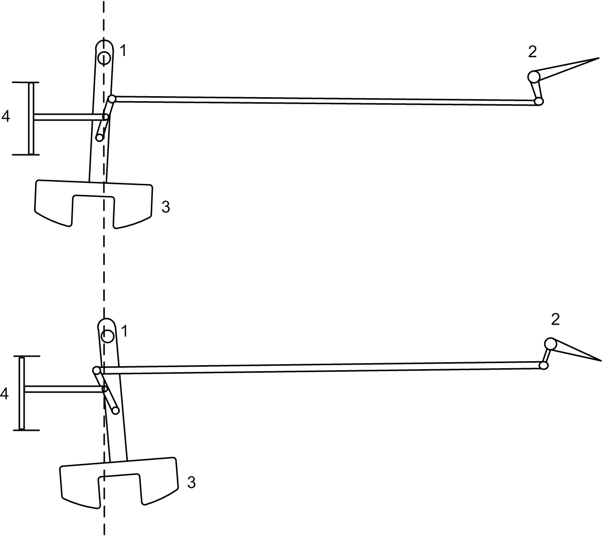 בקר מטוטלת והידרוסטט